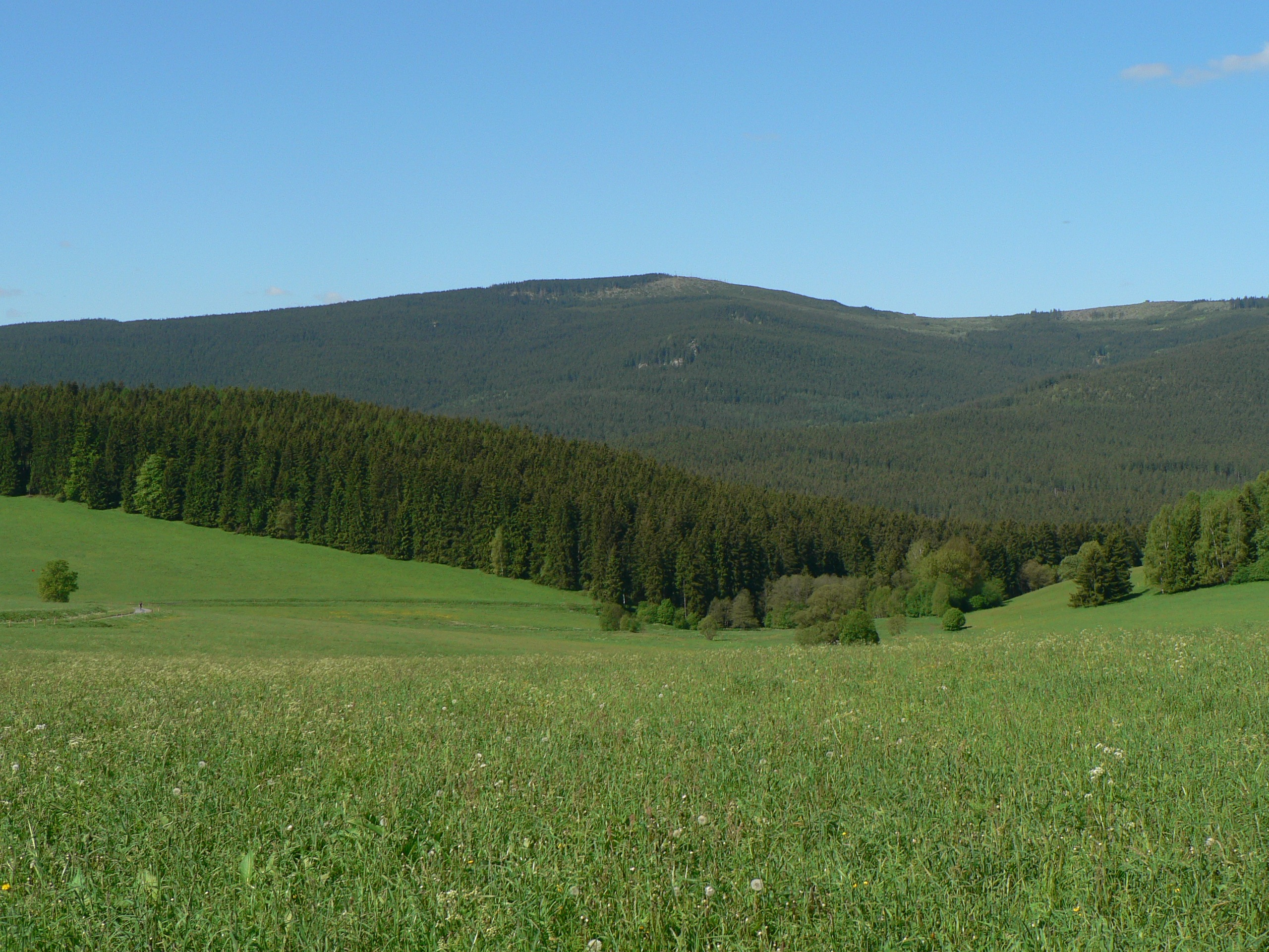 Pohled na Medvědí vrch (1216 m) od východu (u Heřmanic).